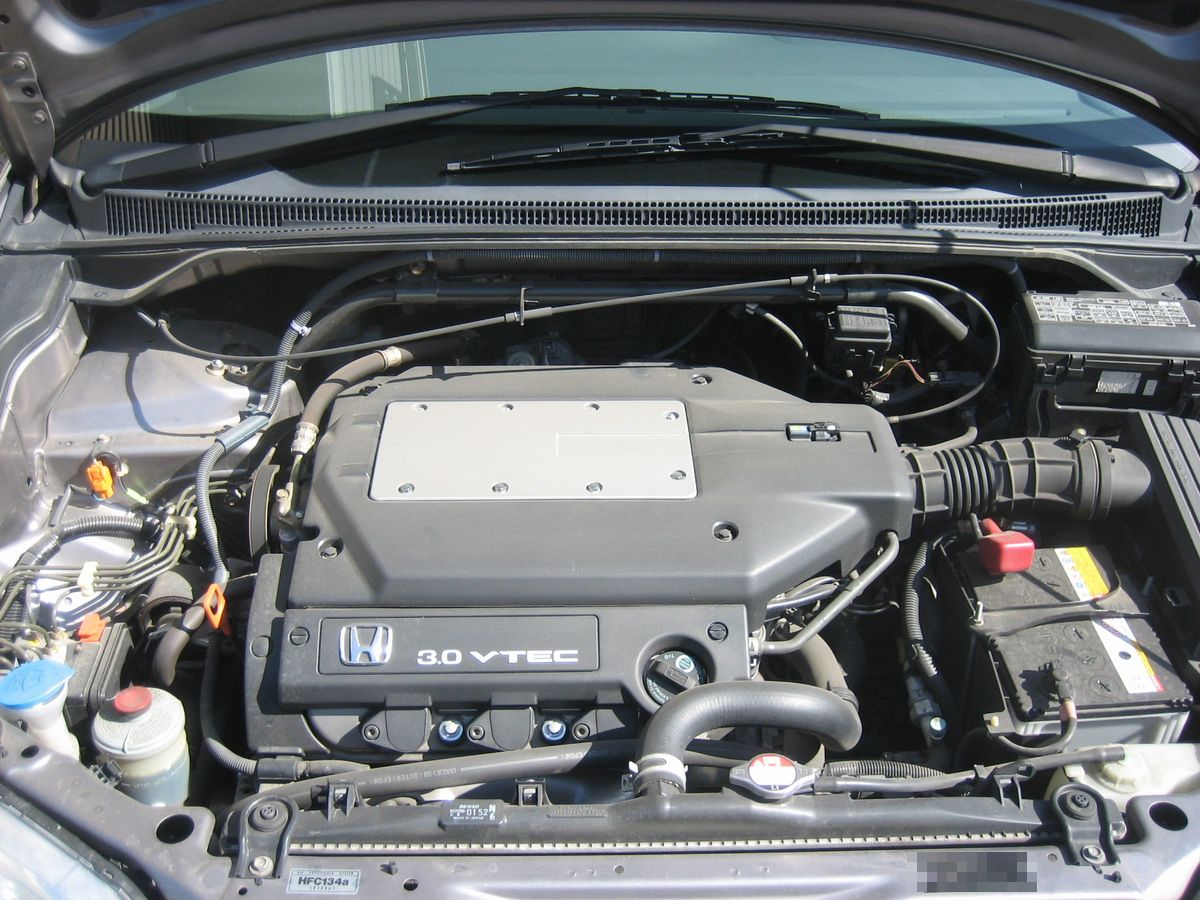 ホンダ・オデッセイのＪ30Ａ型エンジン